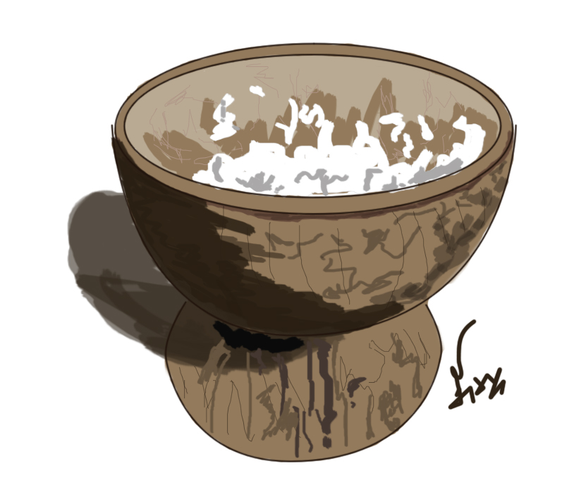 திருநீற்றுக் கொப்பரை